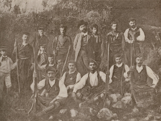 Insurgés Crétois, d'après le correspondant de l'Illustration italienne Un groupe d'insurgés Crétois Le grand chef V - Van Den Brule Alfred - 1907